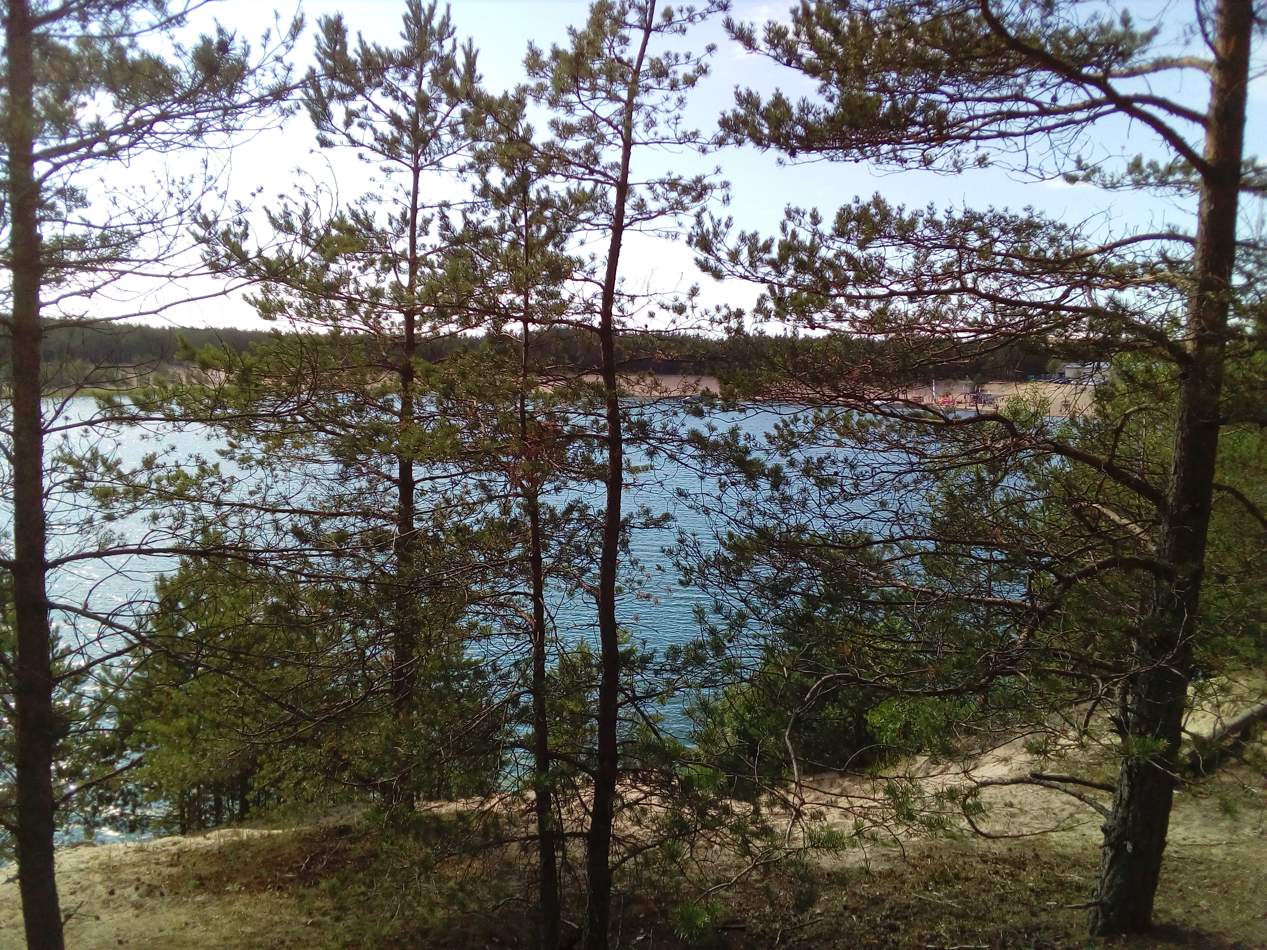 Valdeku karjäär